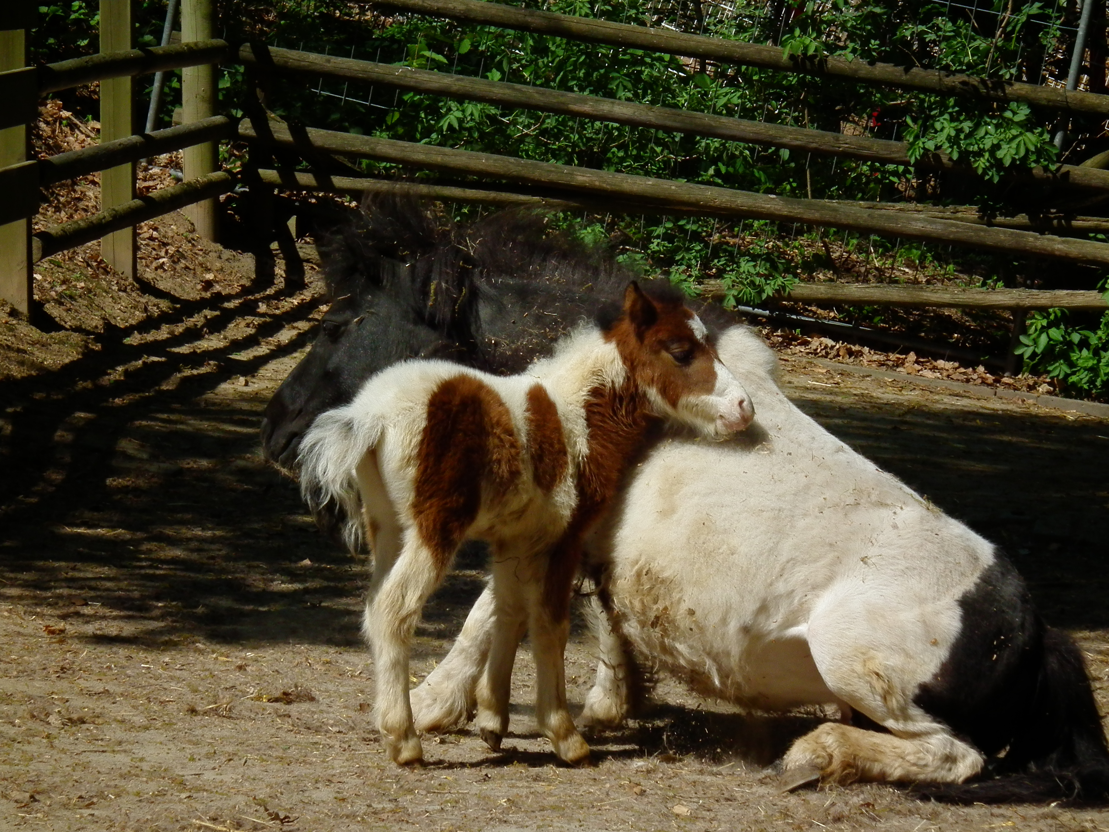 Shetlandpony-Fohlen mit seiner Mutter im Bergtierpark Erlenbach (Hessen, Deutschland)